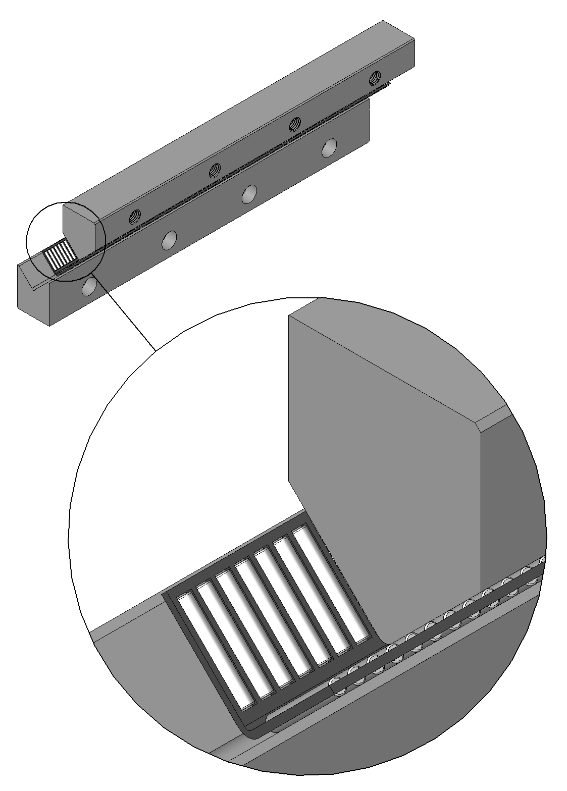 Darstellung einer Linearführung (Flachkäfigführung) nach DIN 644 (Oktober 1997) mit vergrößertem Detail. Die DIN 644 legt die Einbau- und Anschlussmaße für die Führungen fest. Der innere Aufbau bleibt dem Hersteller überlassen. Die hier gezeigte Führung besitzt, in einer V-Nut laufende Nadelrollen als Wälzkörper.